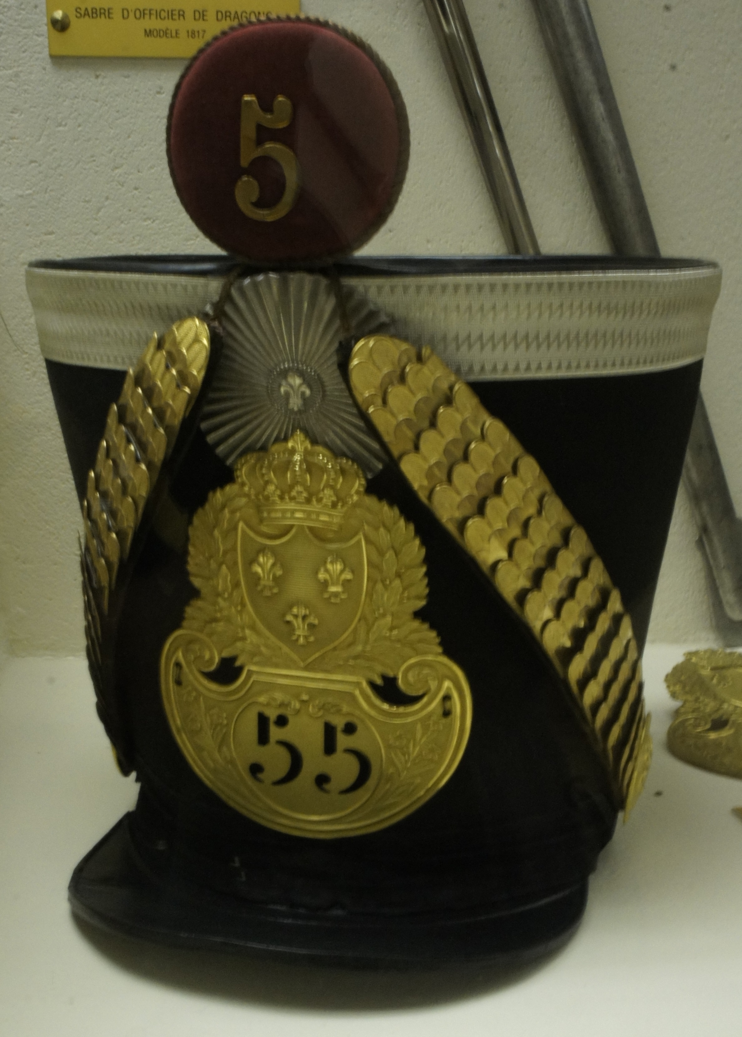 Shako 55 RI ayant apprtenu à Alfred de Vigny .